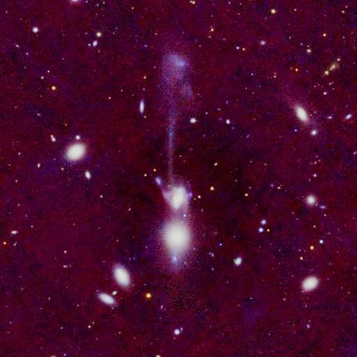 Arp 105 (The Guitar) - PanSTARSS1